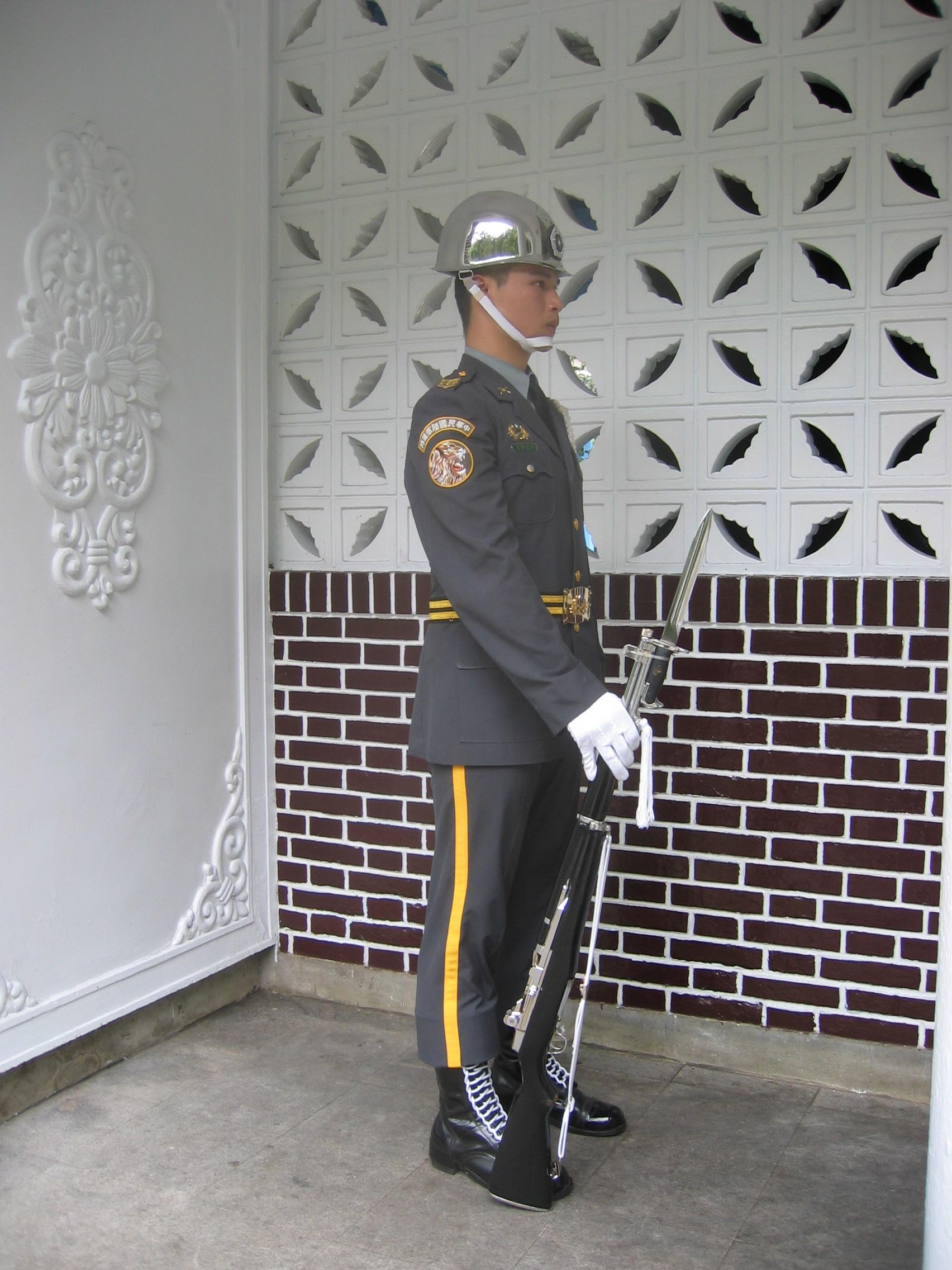 慈湖執勤中的中華民國陸軍儀隊禮兵。